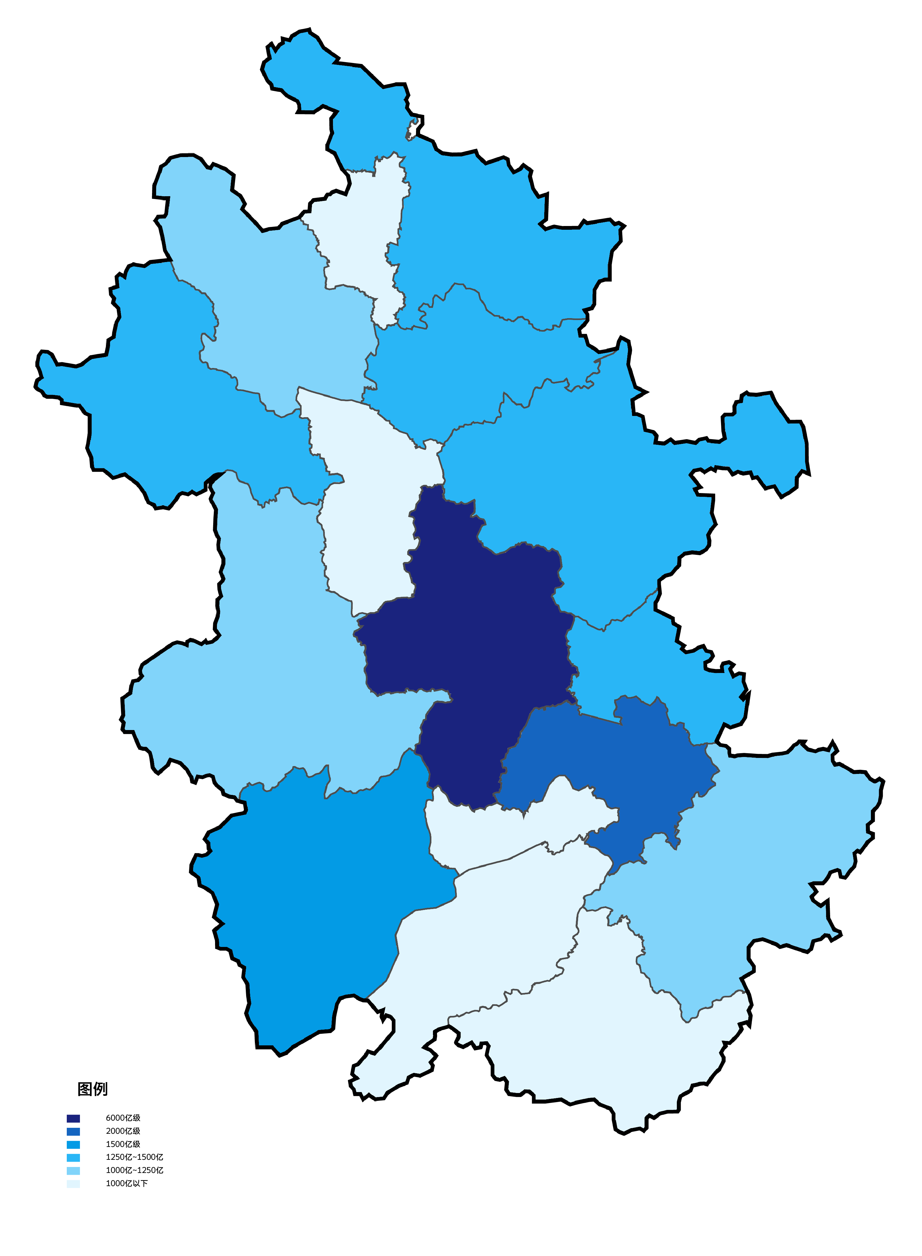 中文（中国大陆）: 安徽省各地级市根据2016年地区生产总值填色地图